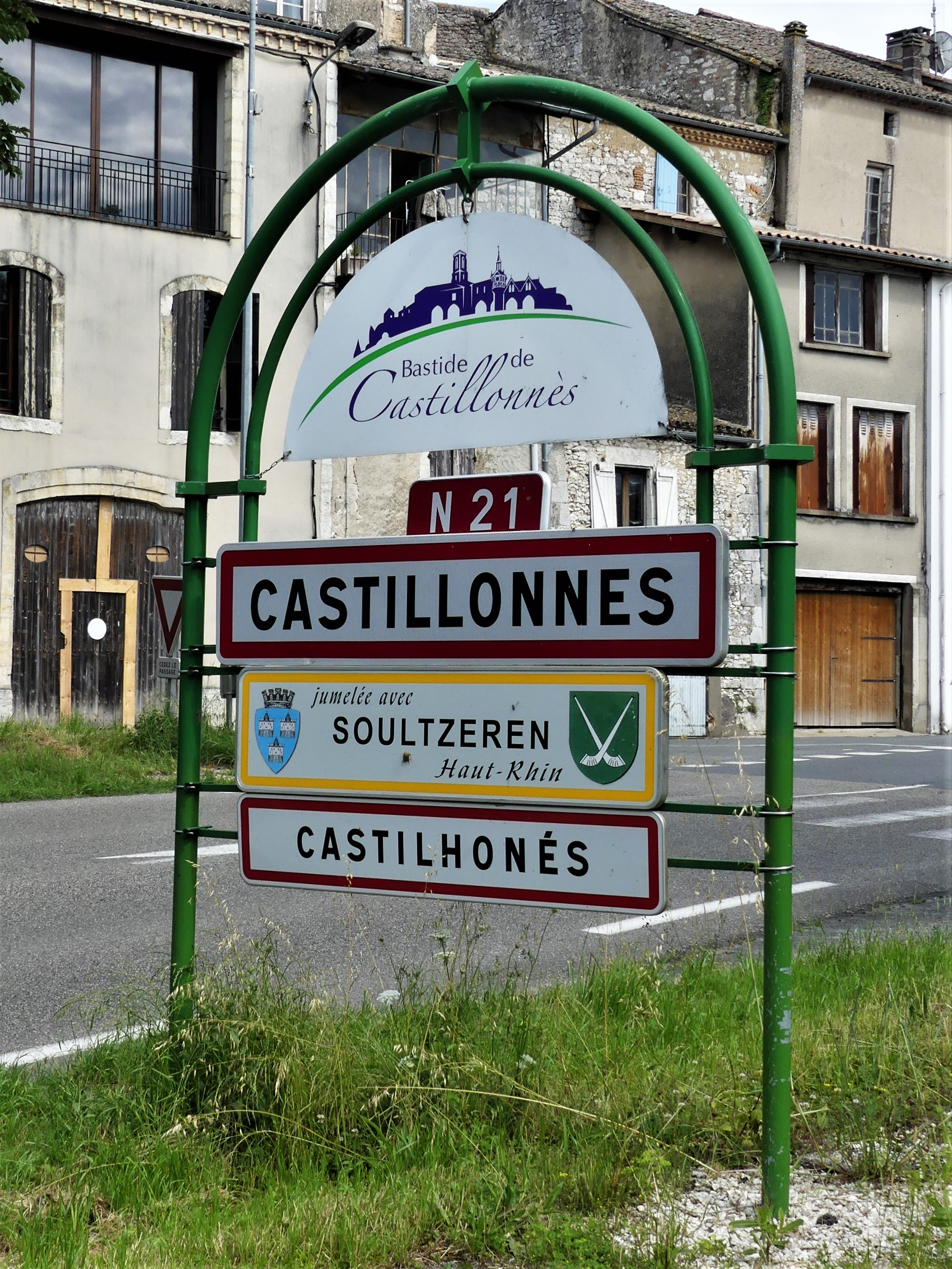 Panneau de jumelage et franco-occitan sur la route nationale 21, Castillonnès, Lot-et-Garonne-France.